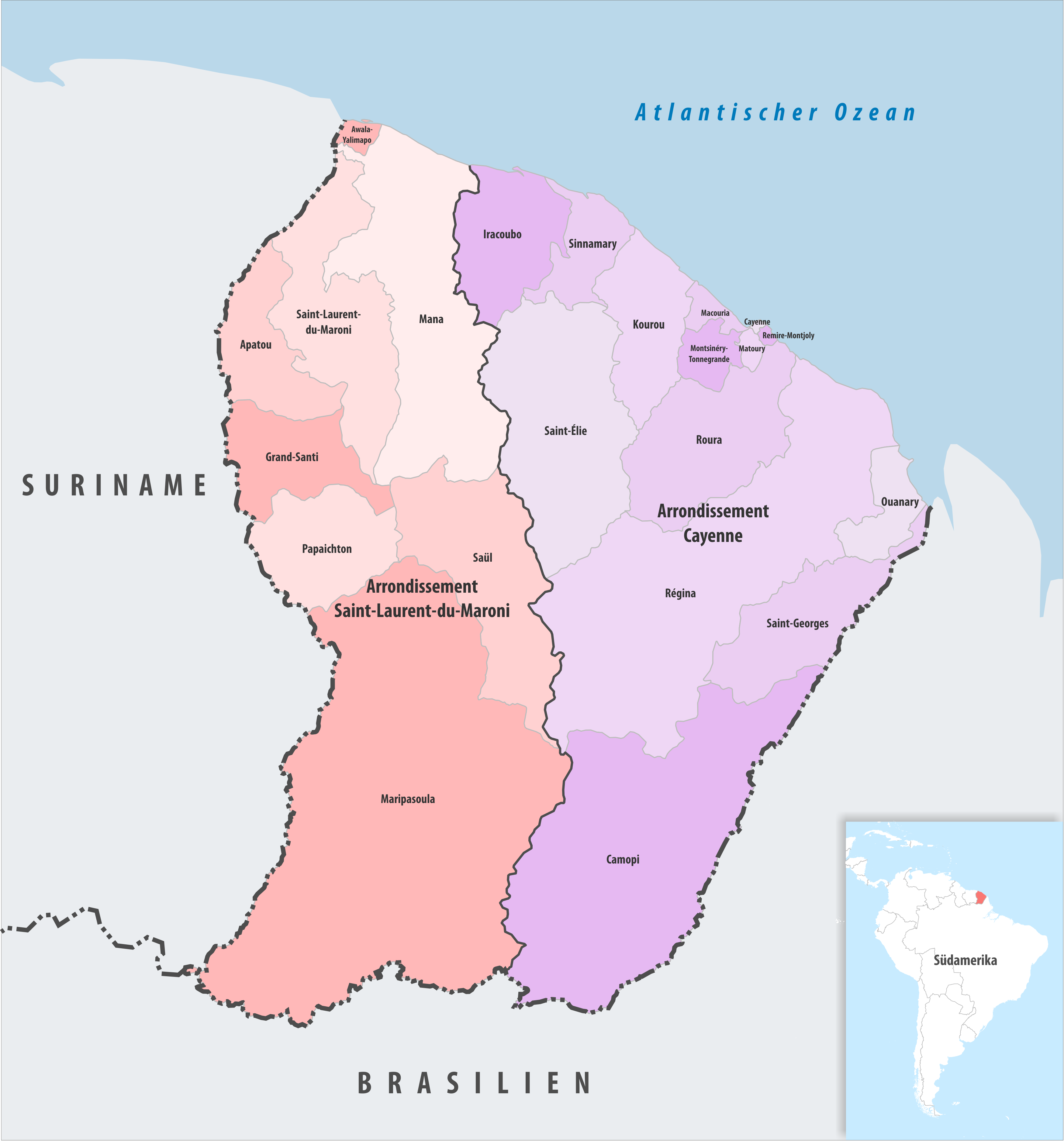 Gemeinden und Arrondissemente in Französisch-Guayana